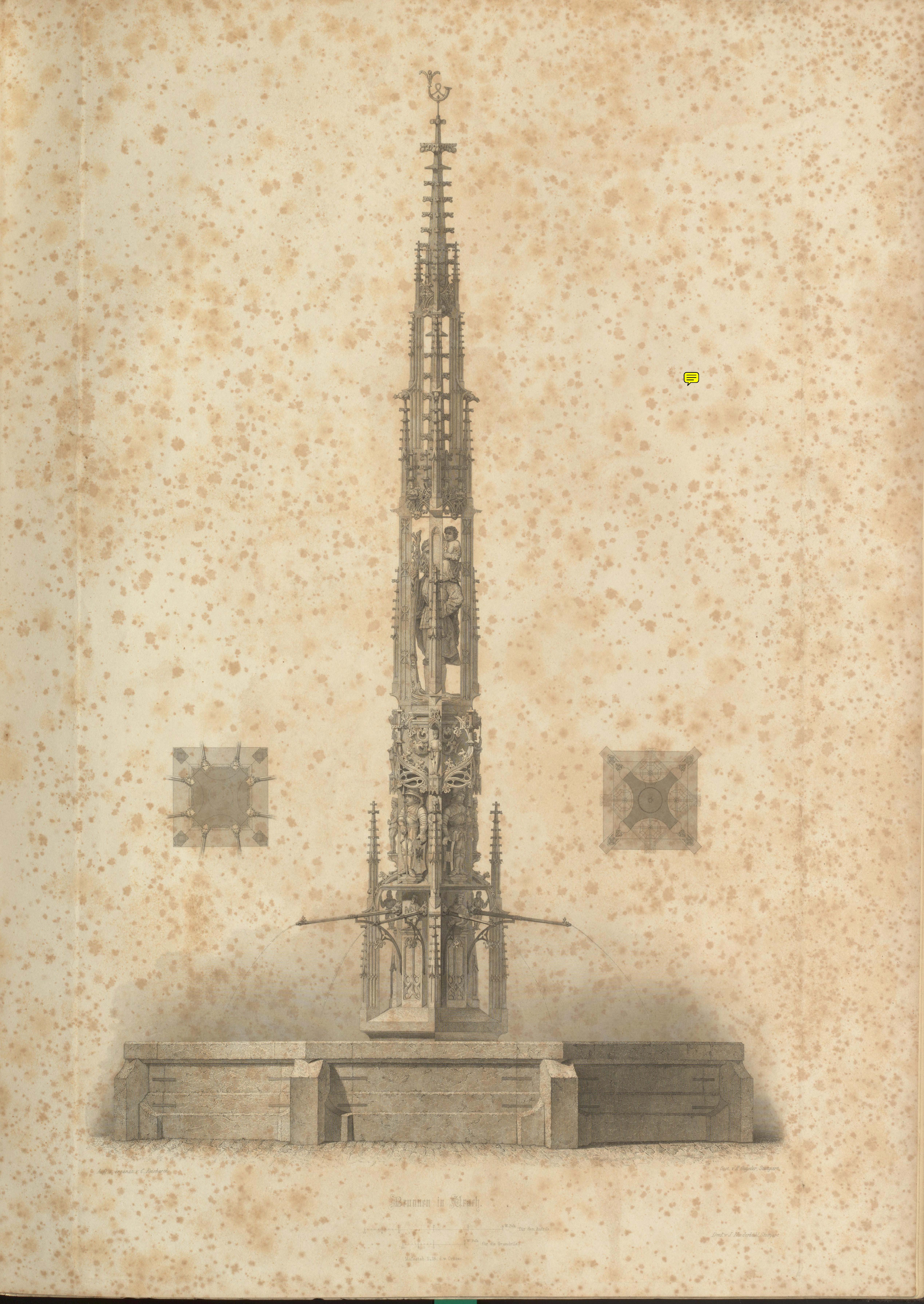 Carl Beisbarth: Der Marktbrunnen in Urach, Zeichnung.